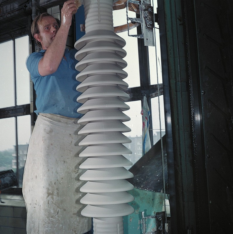 Original image description from the Deutsche Fotothek Facharbeiter für Sintererzeugnisse